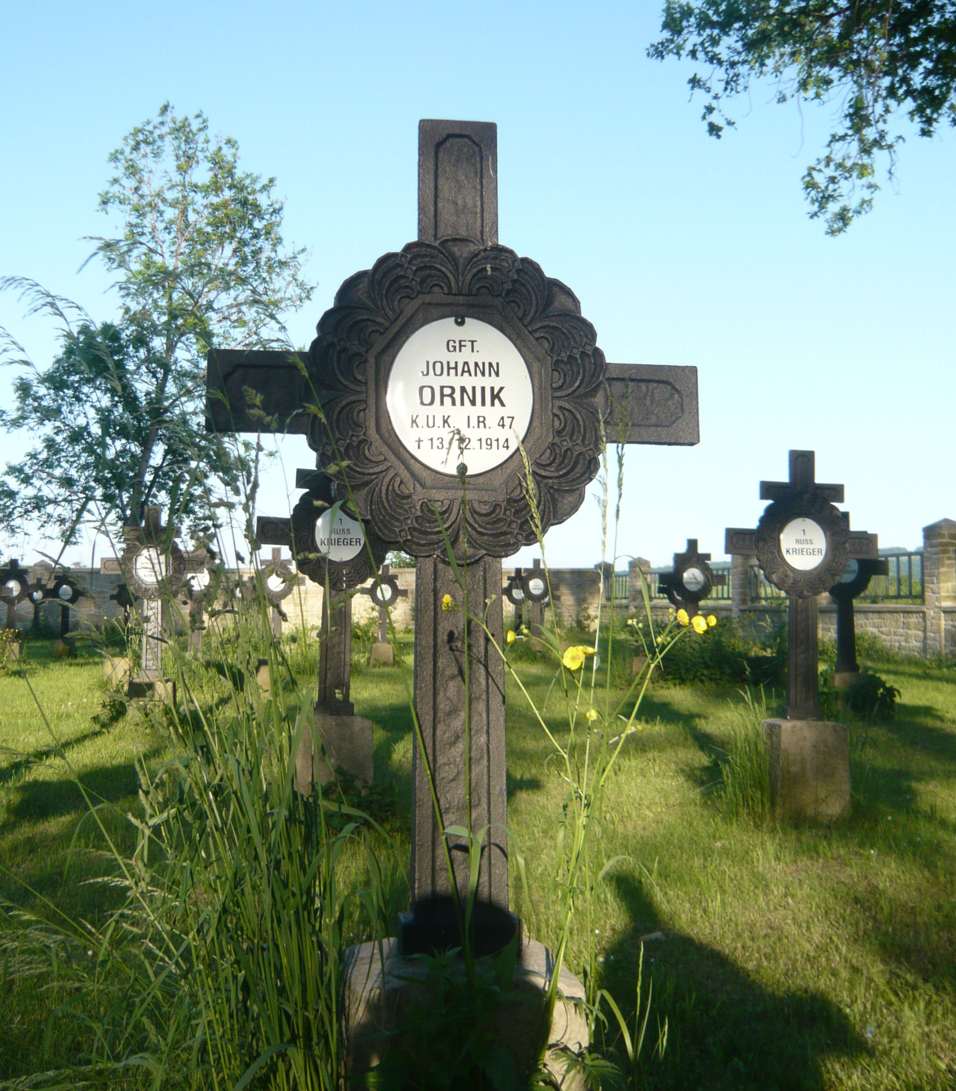 Nagrobek i pomnik z cmentarza nr 8 Nowy Żmigród